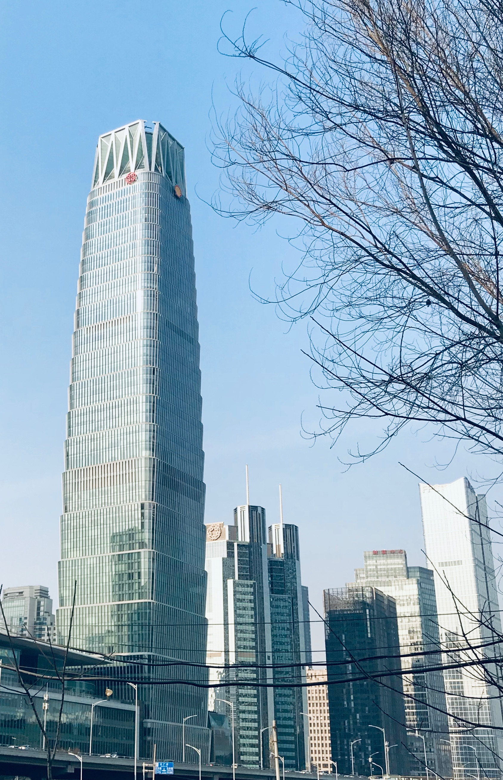 China World Trade Centre Phase 3B (januari 2019)